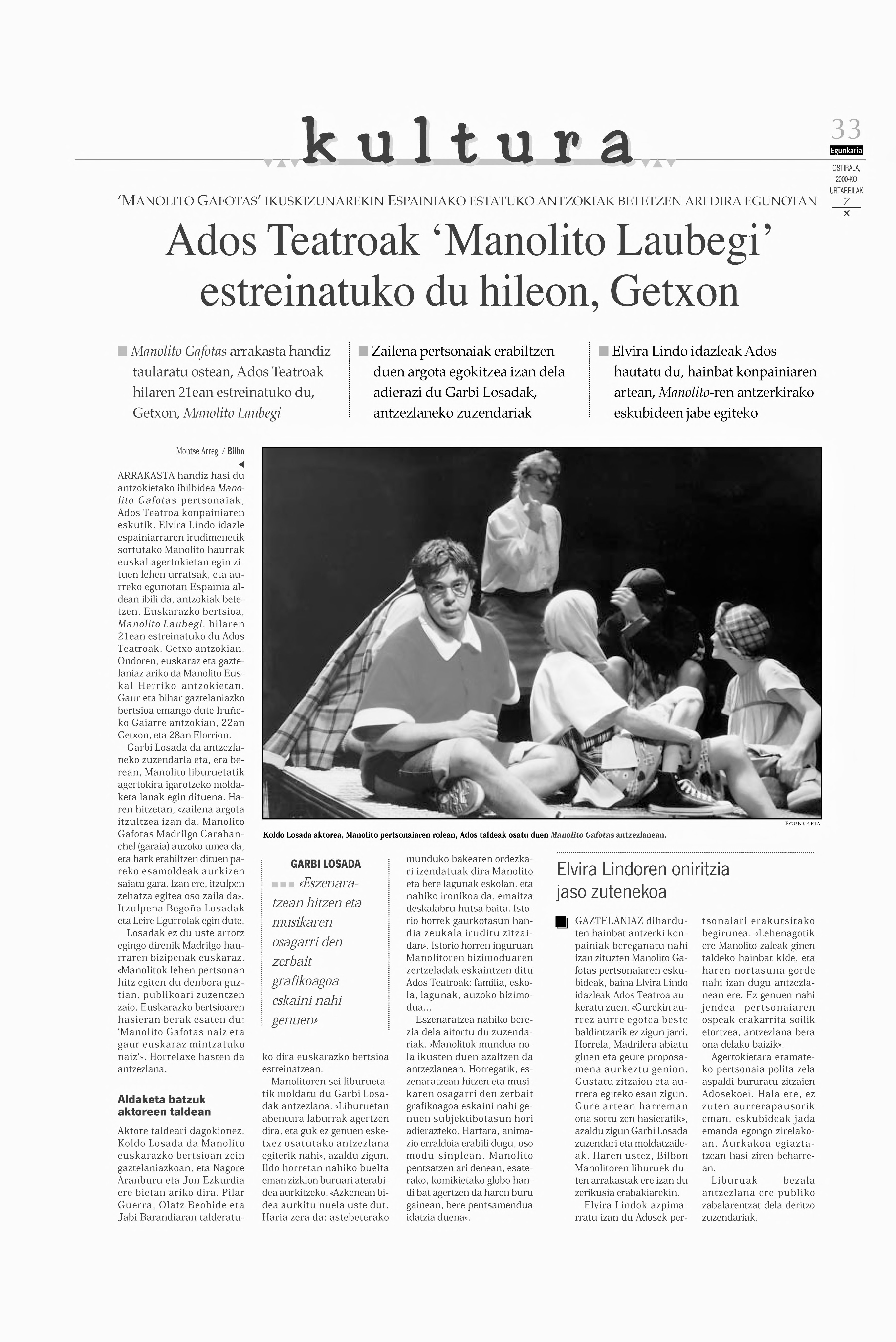 Koldo Losada Manollto Gafotas interpretatzen (Egunkaria, 2000-01-07)